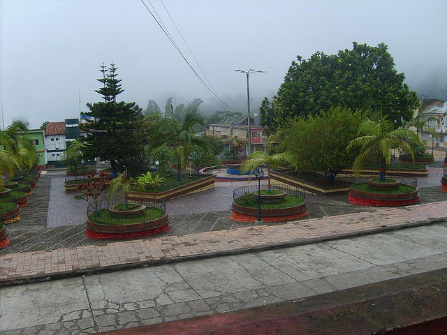 Parque principal de Pauna, Boyacá, Colombia